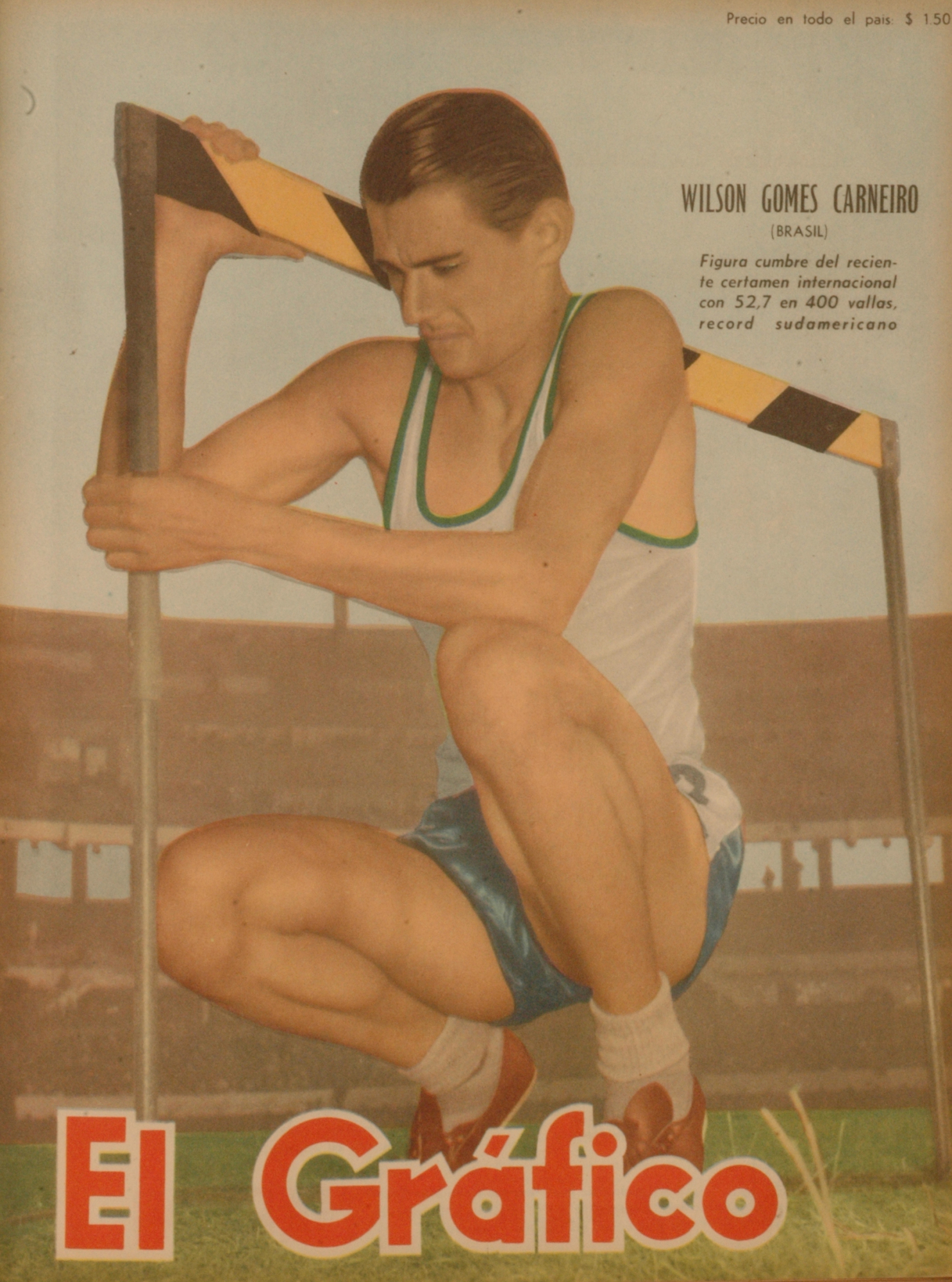 El Grafico del 20 de Junio de 1952. Edicion 1715